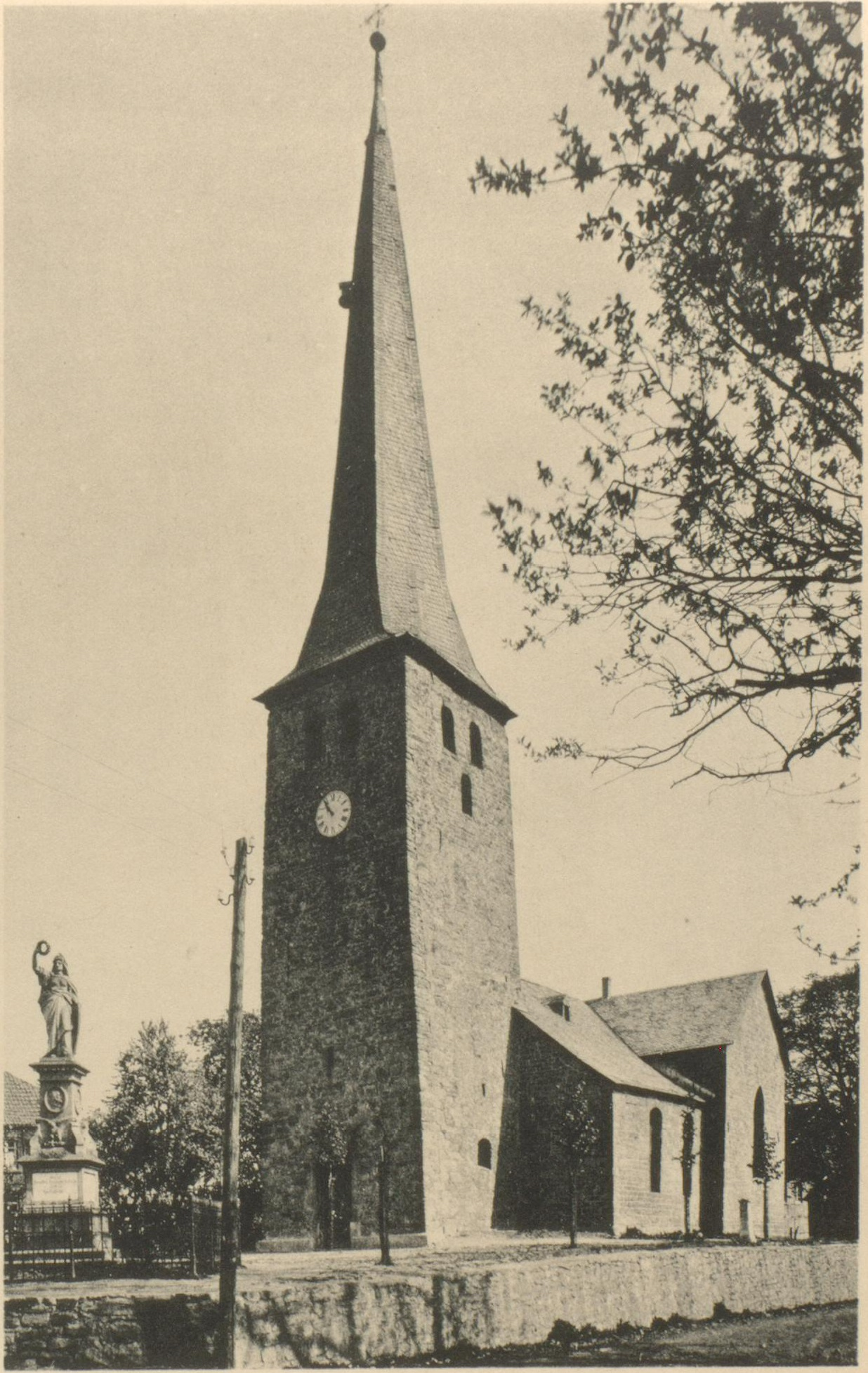 Süd-Westseite der Dionysiuskirche um 1890